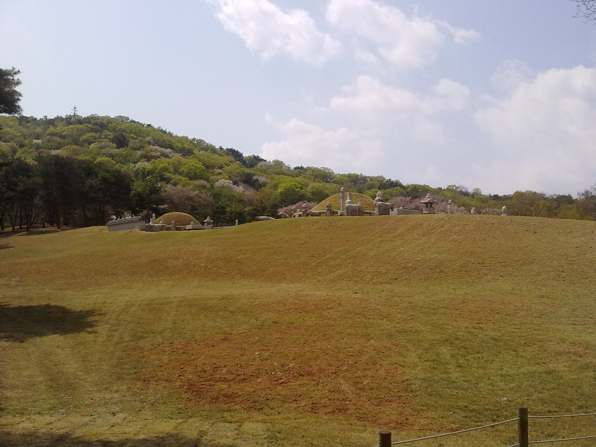 의릉 (조선 경종). 오른쪽(앞쪽)이 선의왕후릉, 왼쪽(뒤쪽)이 의릉.